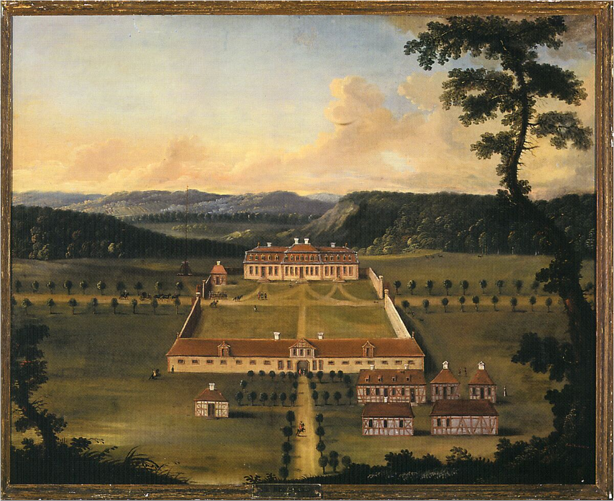 Ansicht des ehemaligen Jagdschlosses Zwiefalten. Ölgemälde auf Leinwand. Museum Schloss Kranichstein